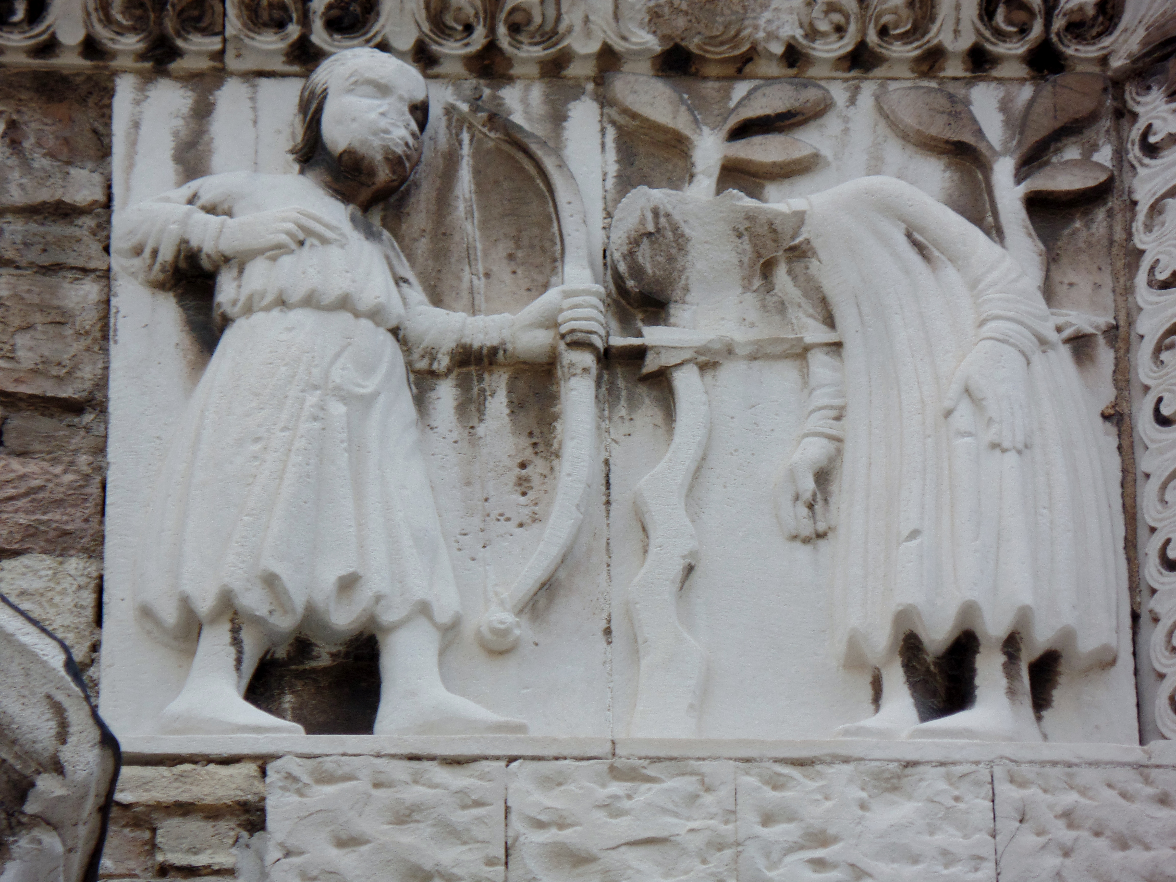 Palazzo degli Anziani Ancona incisione facciata destra